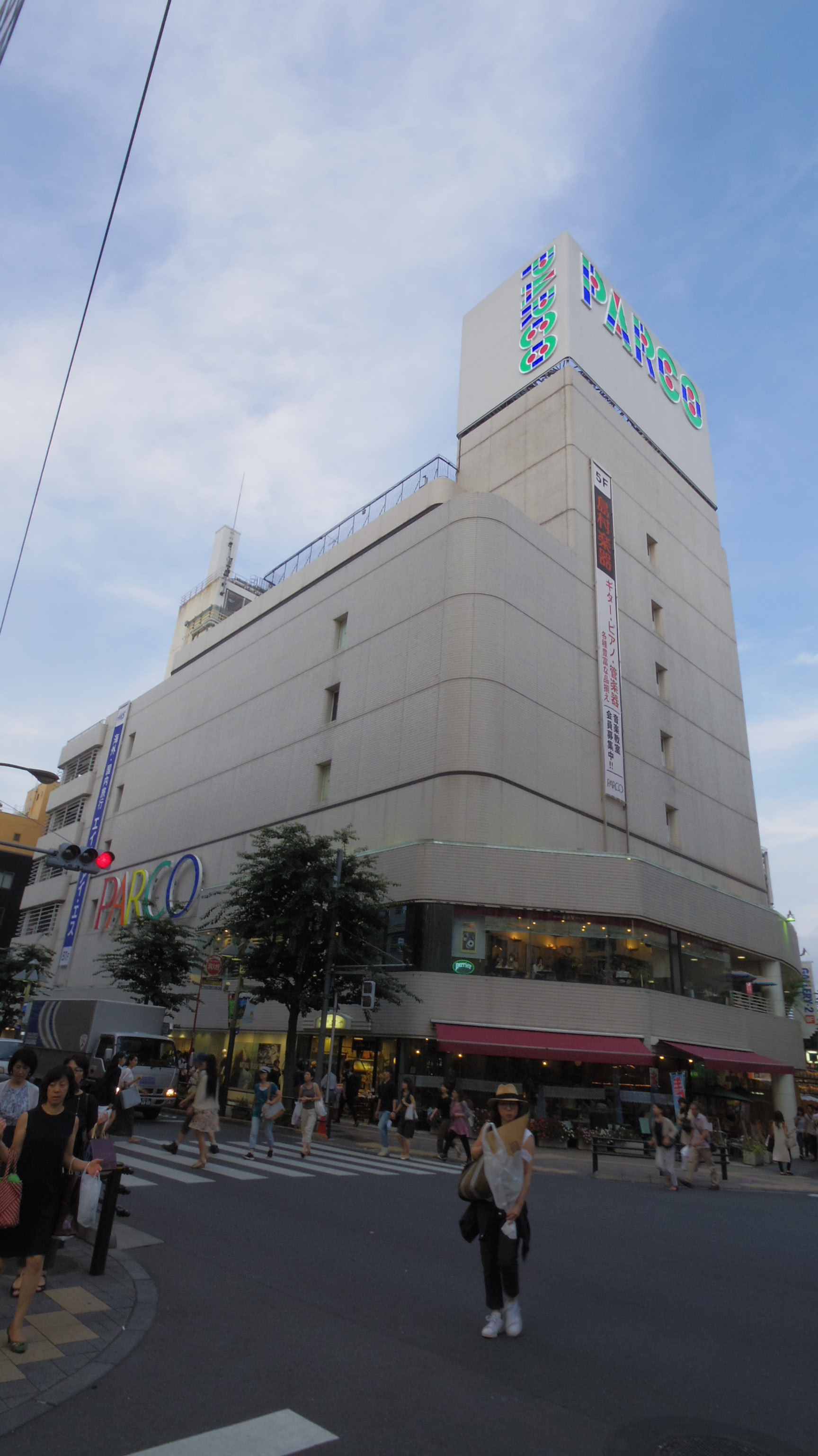 吉祥寺パルコ外観。 2017年9月9日撮影。